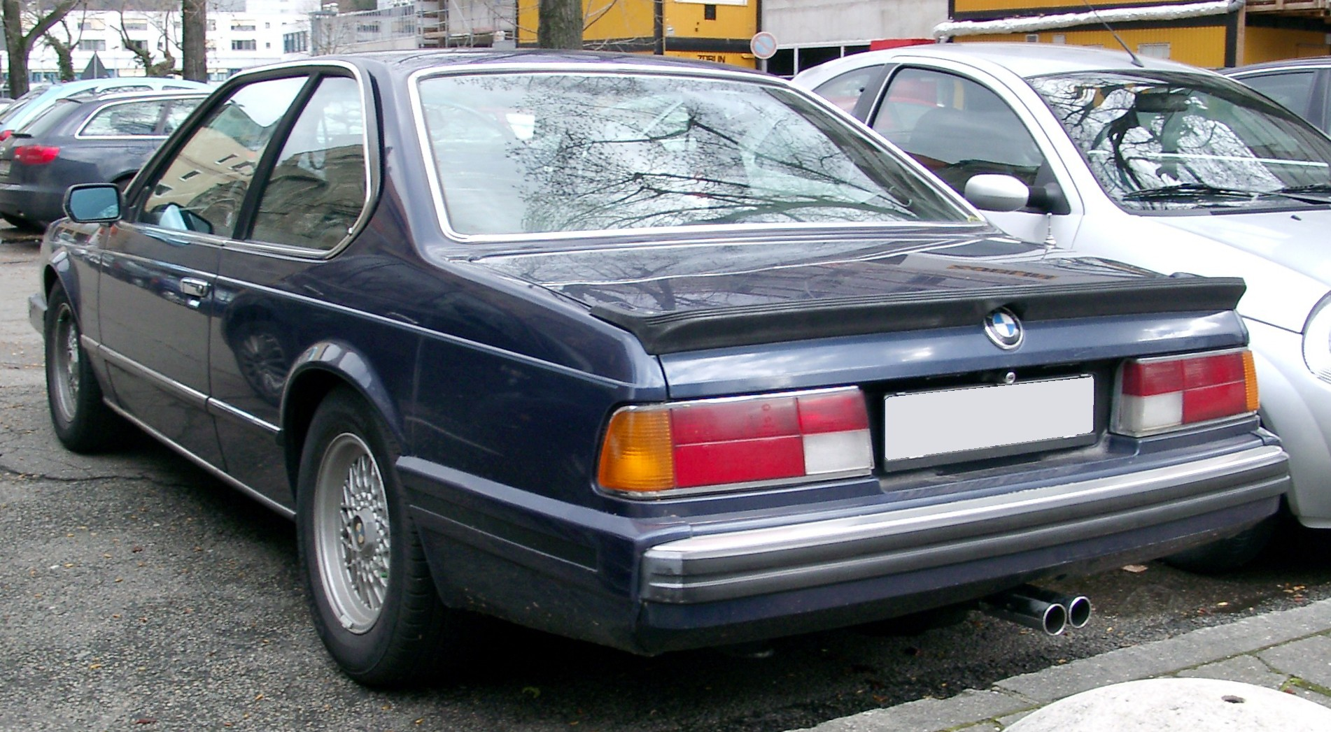 BMW E24